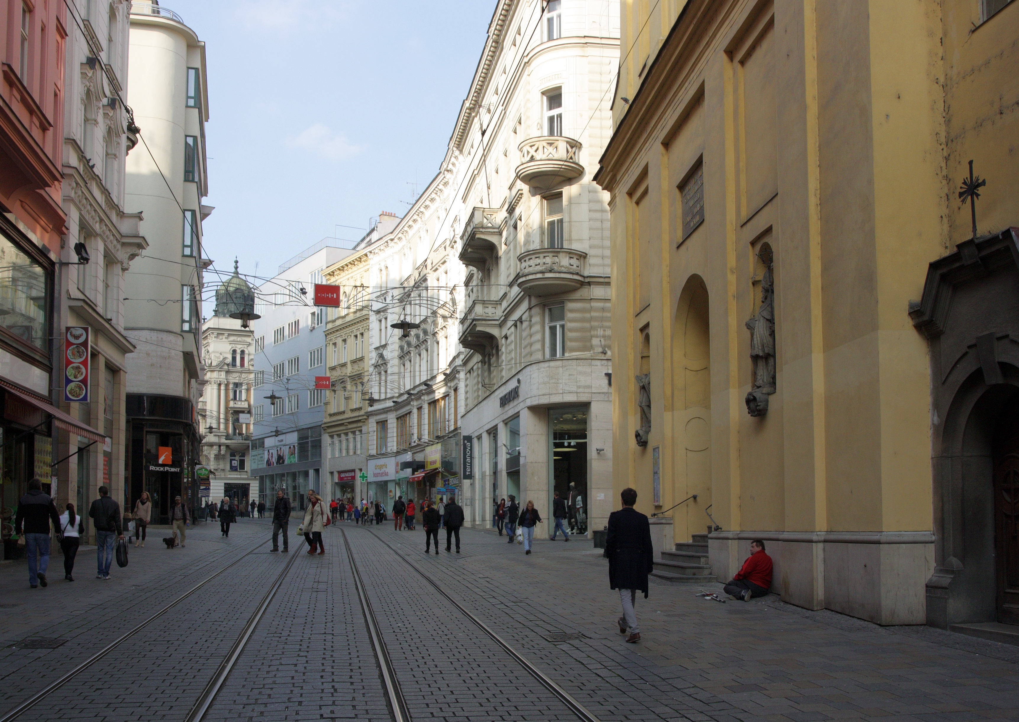 Brno - Masarykova ulice a kostel Máří Magdalény.